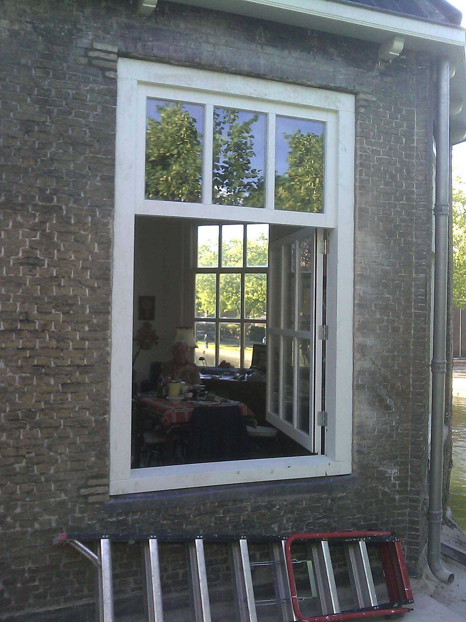 in 2011 is het achtste raam weer terug geplaatst